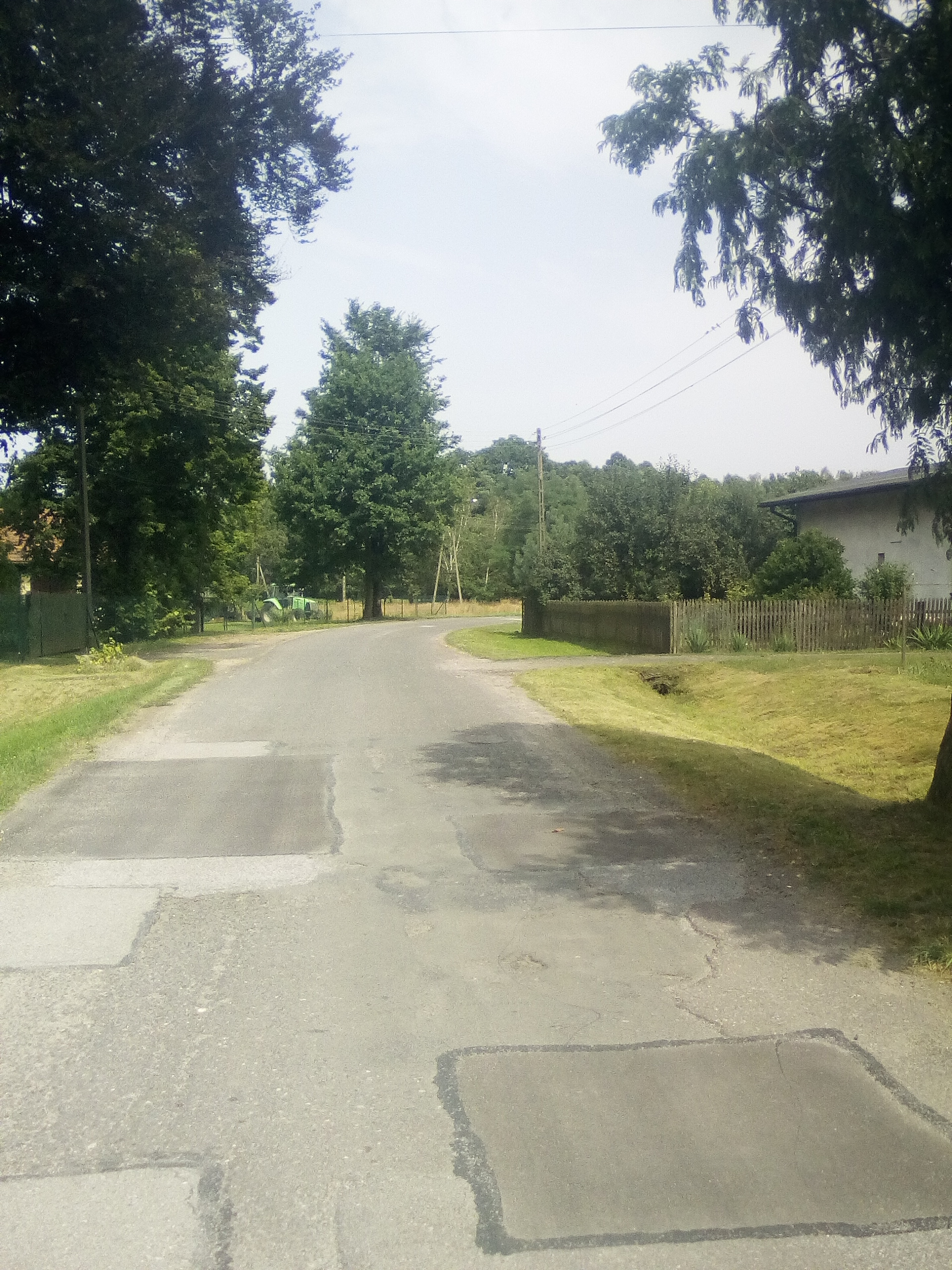 Wygląd Branicy ze strony lasu